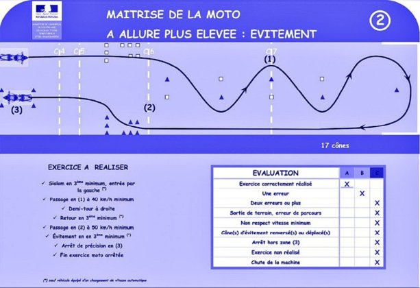 Epreuve d'évitement, permis moto Français